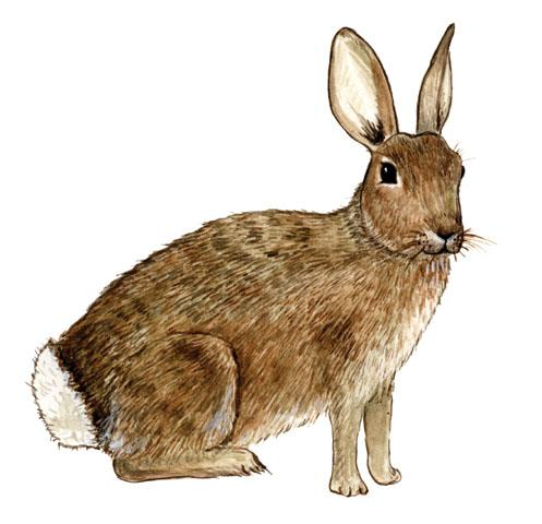 Tekening van een katoenstaartkonijn